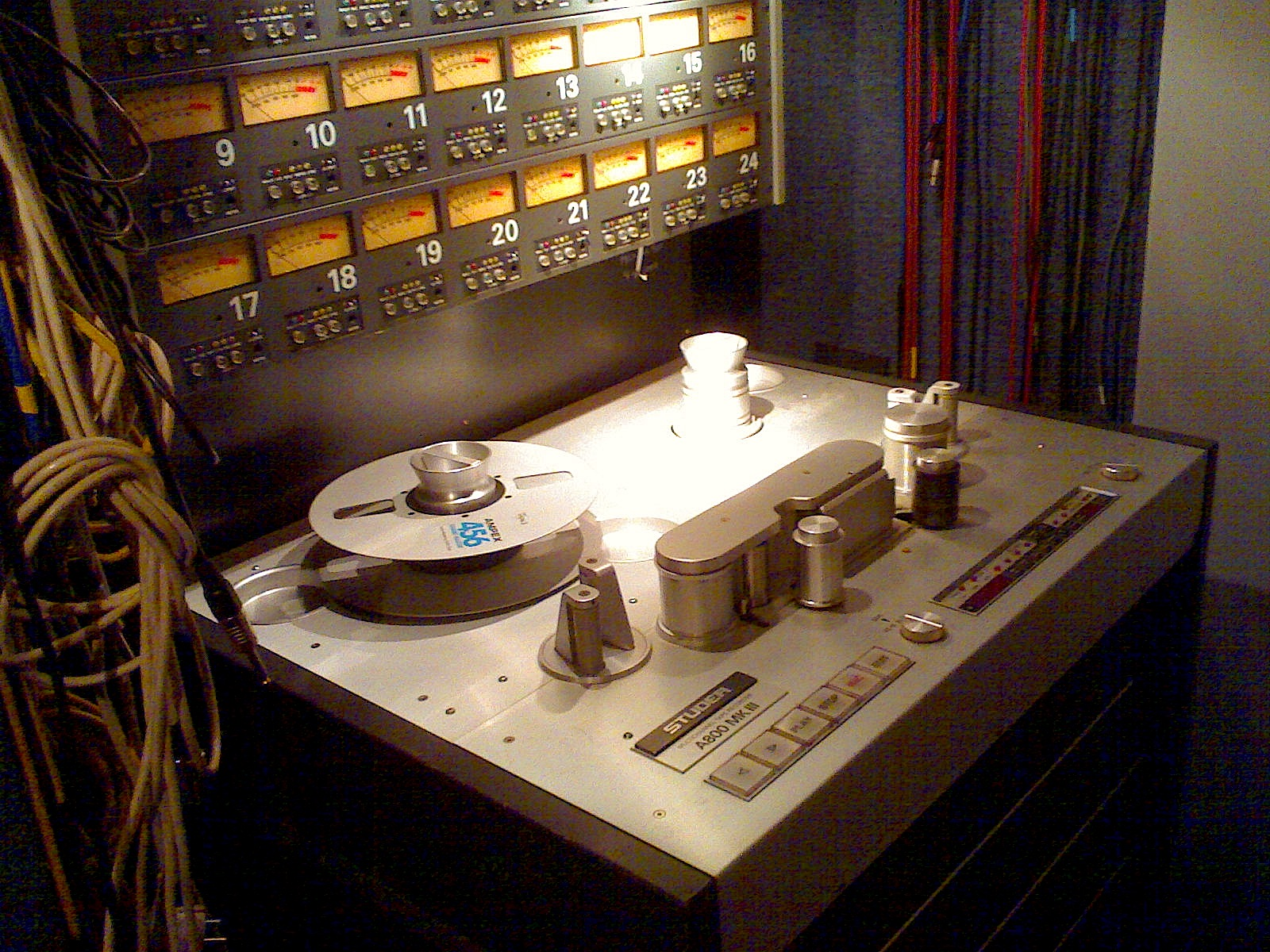 A lovely vintage Studer open reel machine